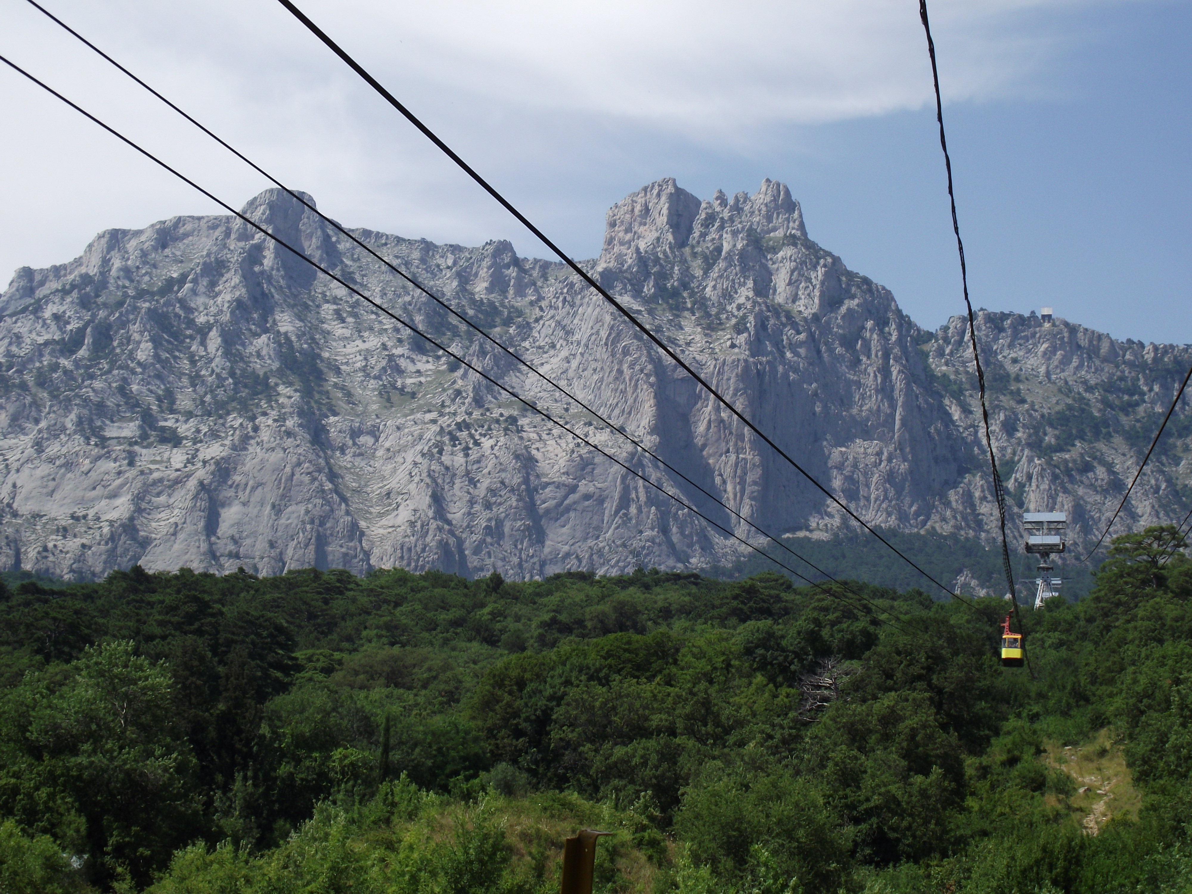 Канатная дорога в Большой Ялте